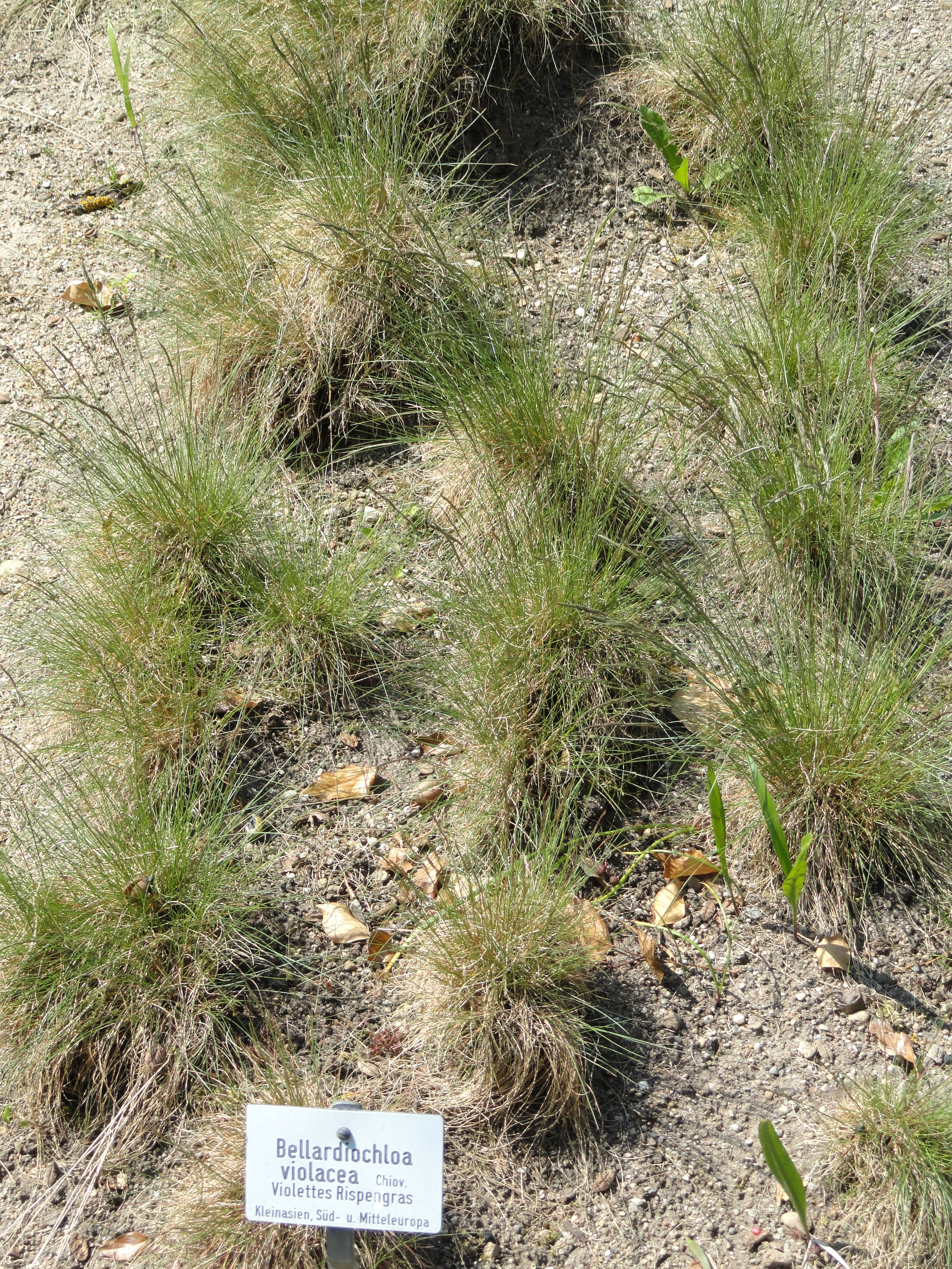 Bellardiochloa violacea specimen in the Botanischer Garten München-Nymphenburg, Munich, Germany.